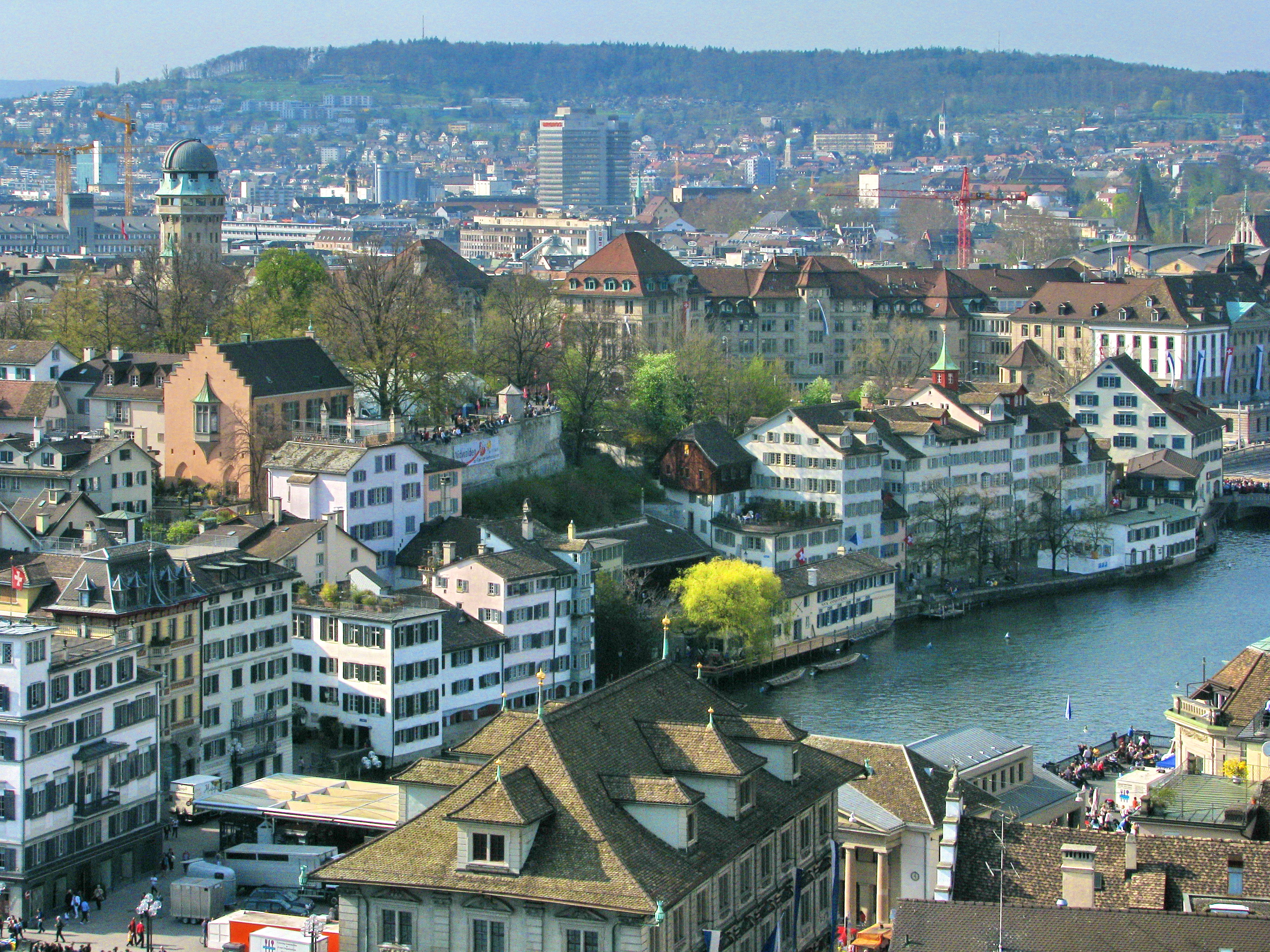 Käferberg, Lindenhof hill, Schipfe and Limmat in Zürich (Switzerland) as seen from Grossmünster's Karlsturm